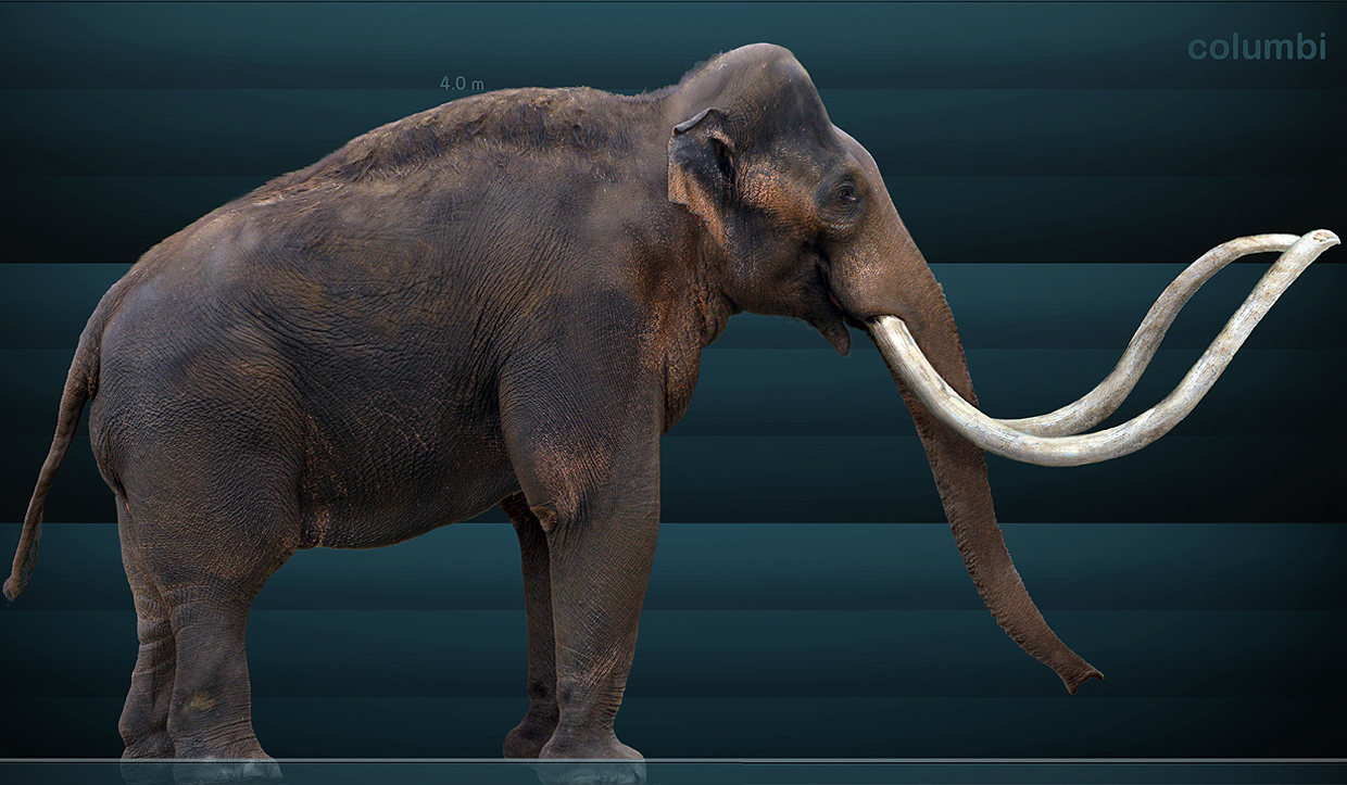 Reconstrucción - interpretación del Mammuthus columbi